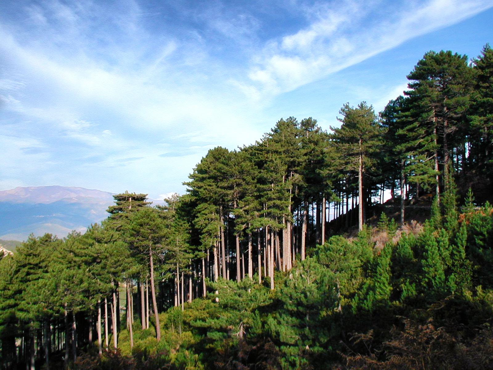 Rospigliani, Rogna in La (Corse) - Forêt territoriale de Rospa-Sorba